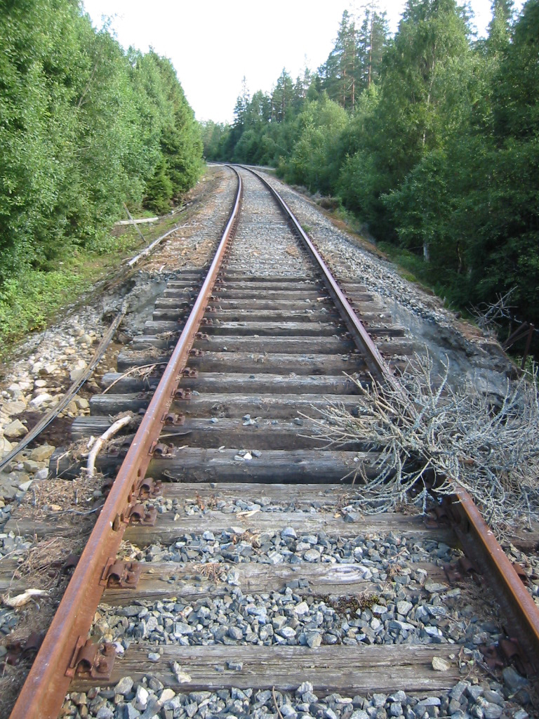 Numedalsbanen ved Bjørnsrud ca 3 km nord for Flesberg